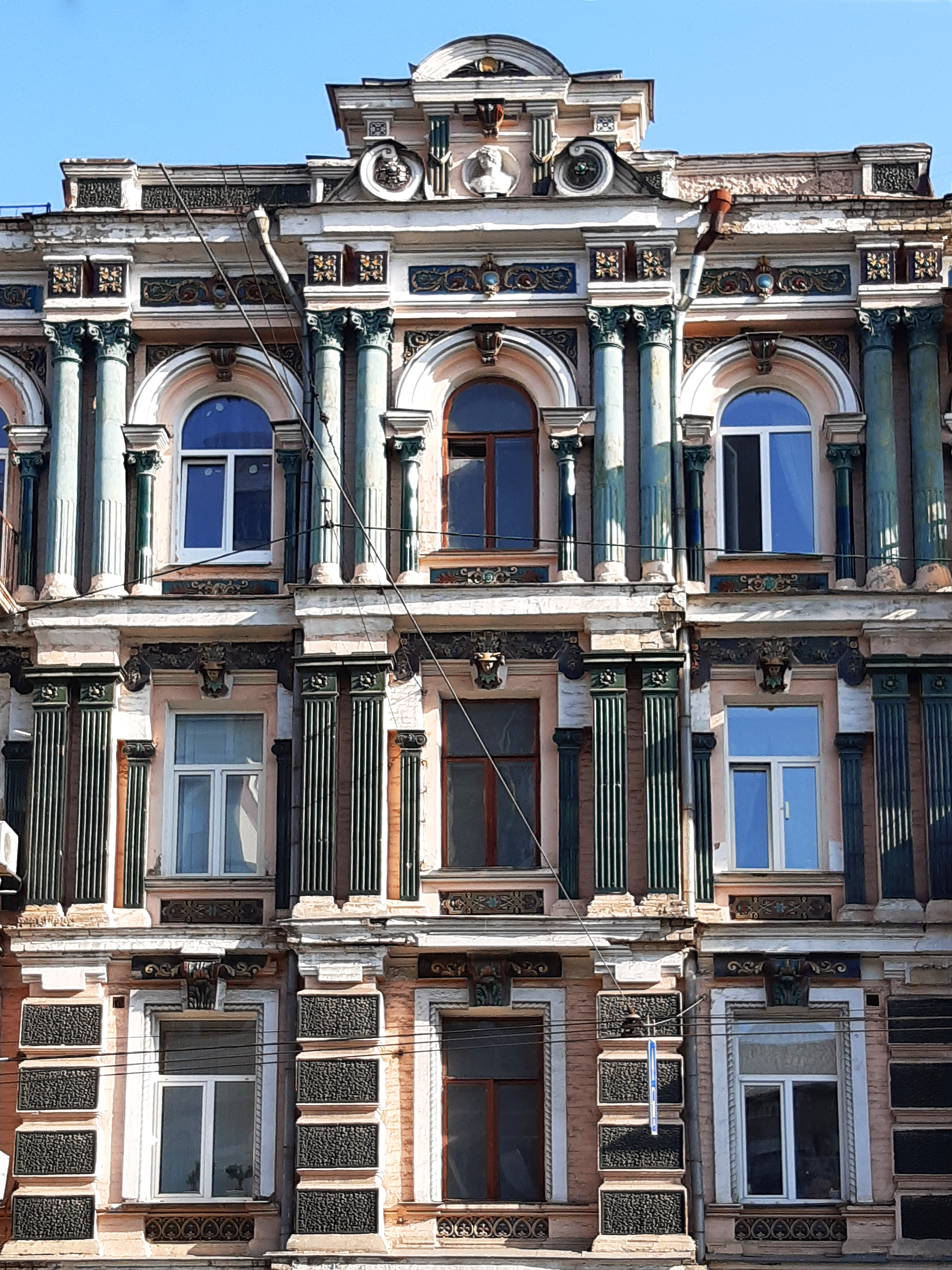 Будинок із левами на бульварі Тараса Шевченка, 48-А. Київ